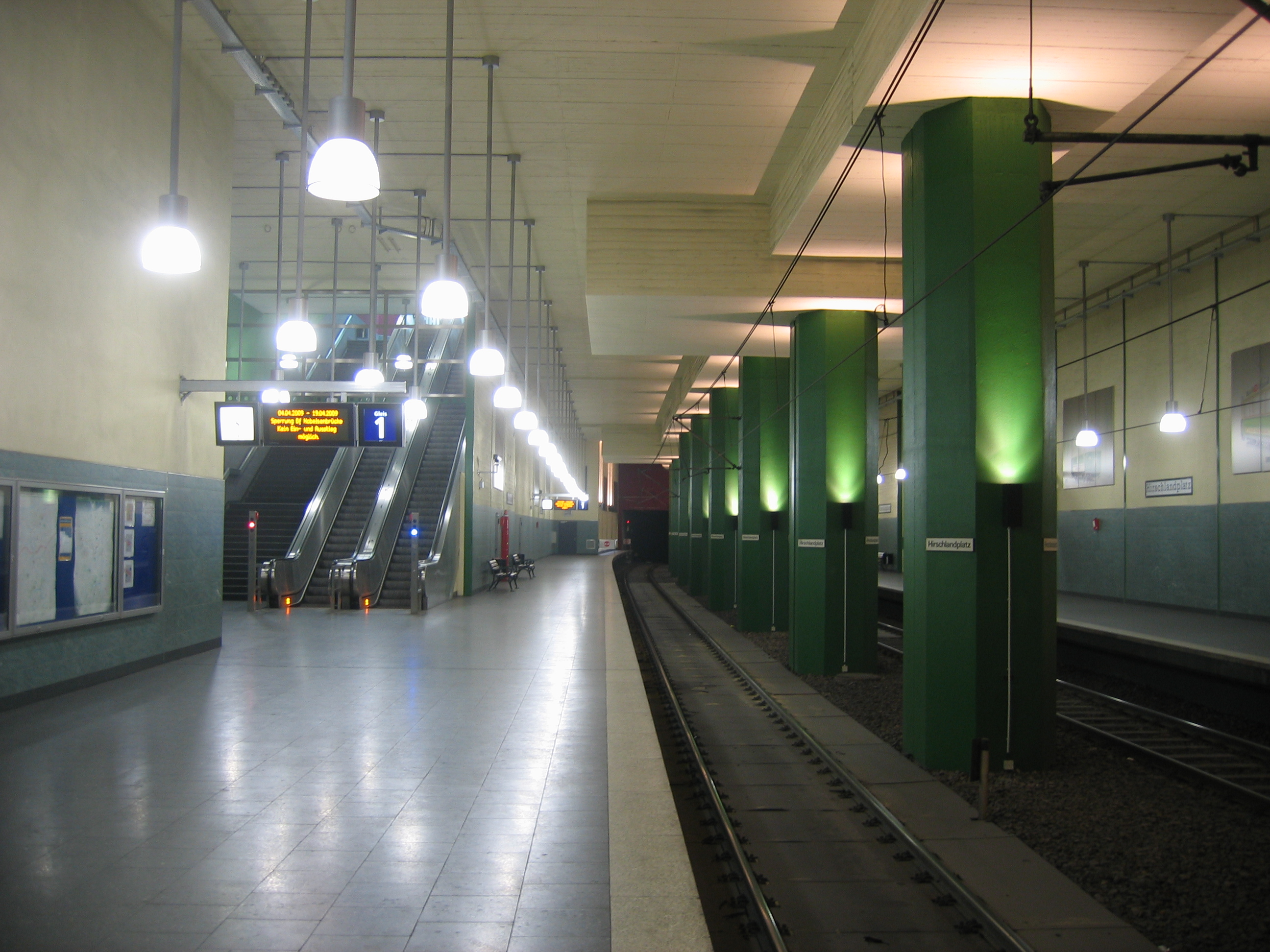 Stadtbahn Essen, U-Bahnhof Hirschlandplatz